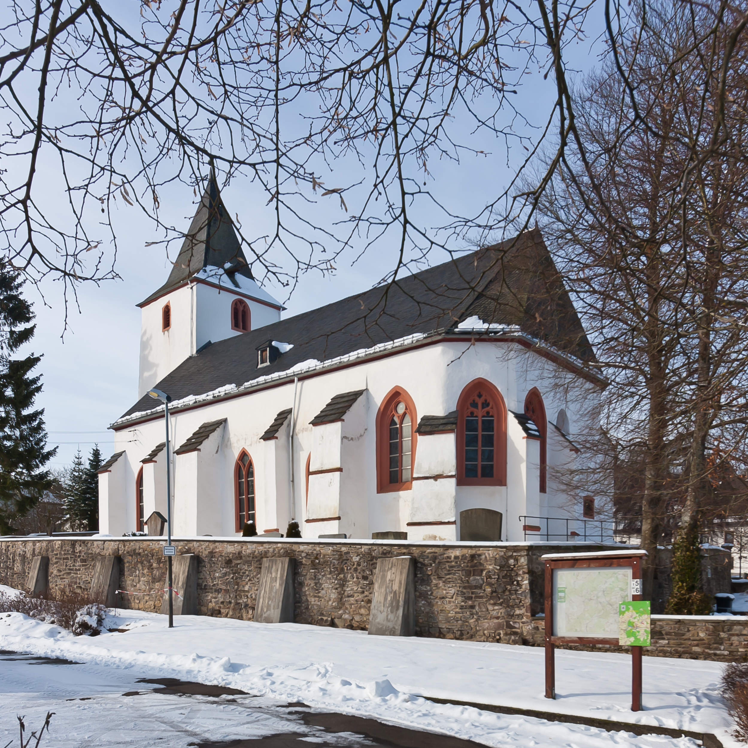 St. Mariä Geburt in Dahlem-Baasem This is a photograph of an architectural monument.